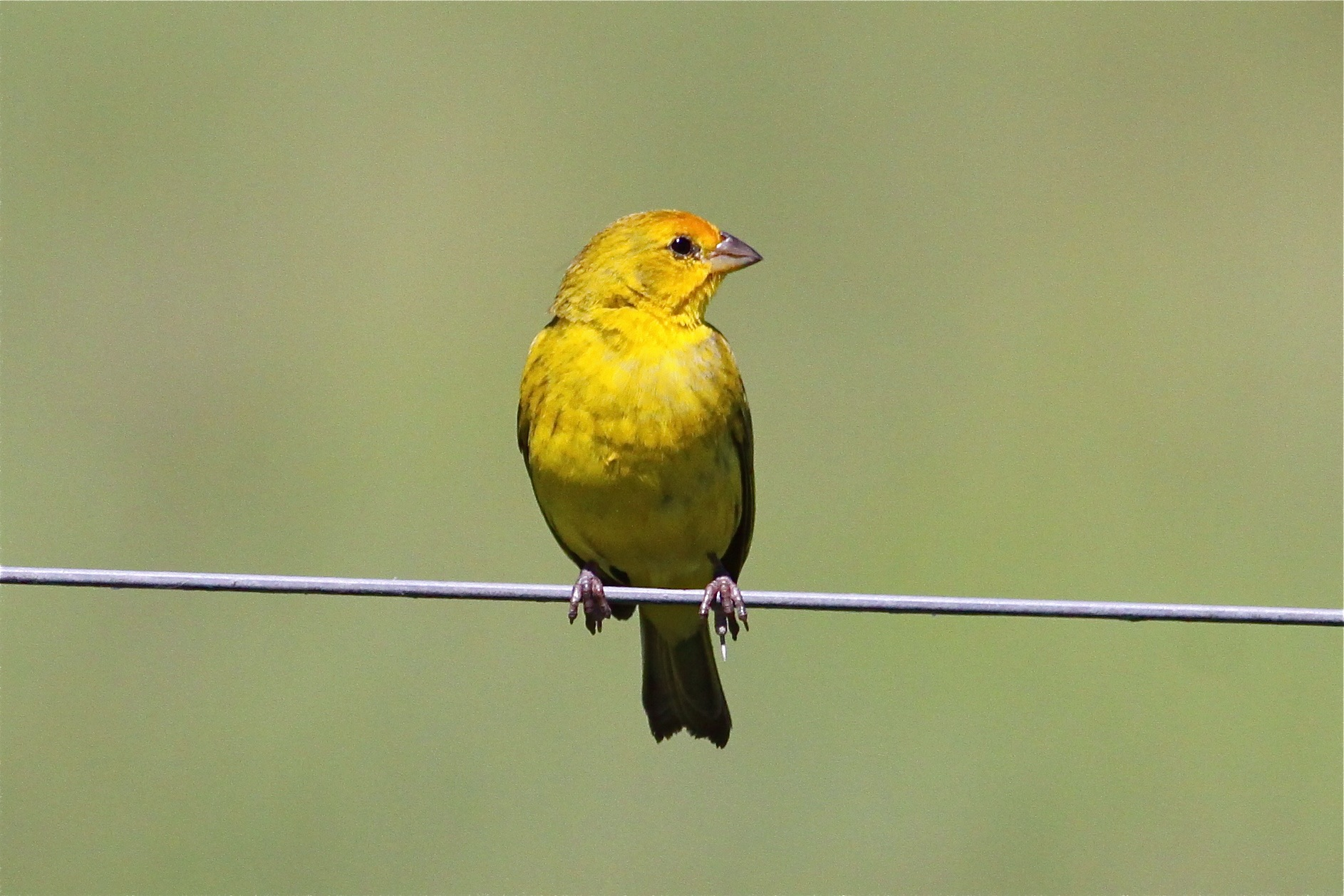 Ceibas area, Entre Rios, Argentina